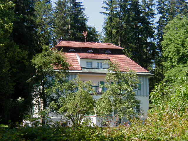 Esta casa na Rua Heißstrasse em Bad Tölz, 50 kms a sul de Munique, na proximidade dos Alpes, pertenceu a Thomas Mann entre pt:1909 e pt:1917. Thomas Mann, então residente em Munique, já casado com Katia Pringsheim, passava aqui o Verão. Thomas Mann besaß hier von 1906 bis 1917 eine Sommervilla, die heutige Villa Mann; ein Jahr vor Ende des Ersten Weltkrieges veräußerte er sie gegen eine Kriegsanleihe